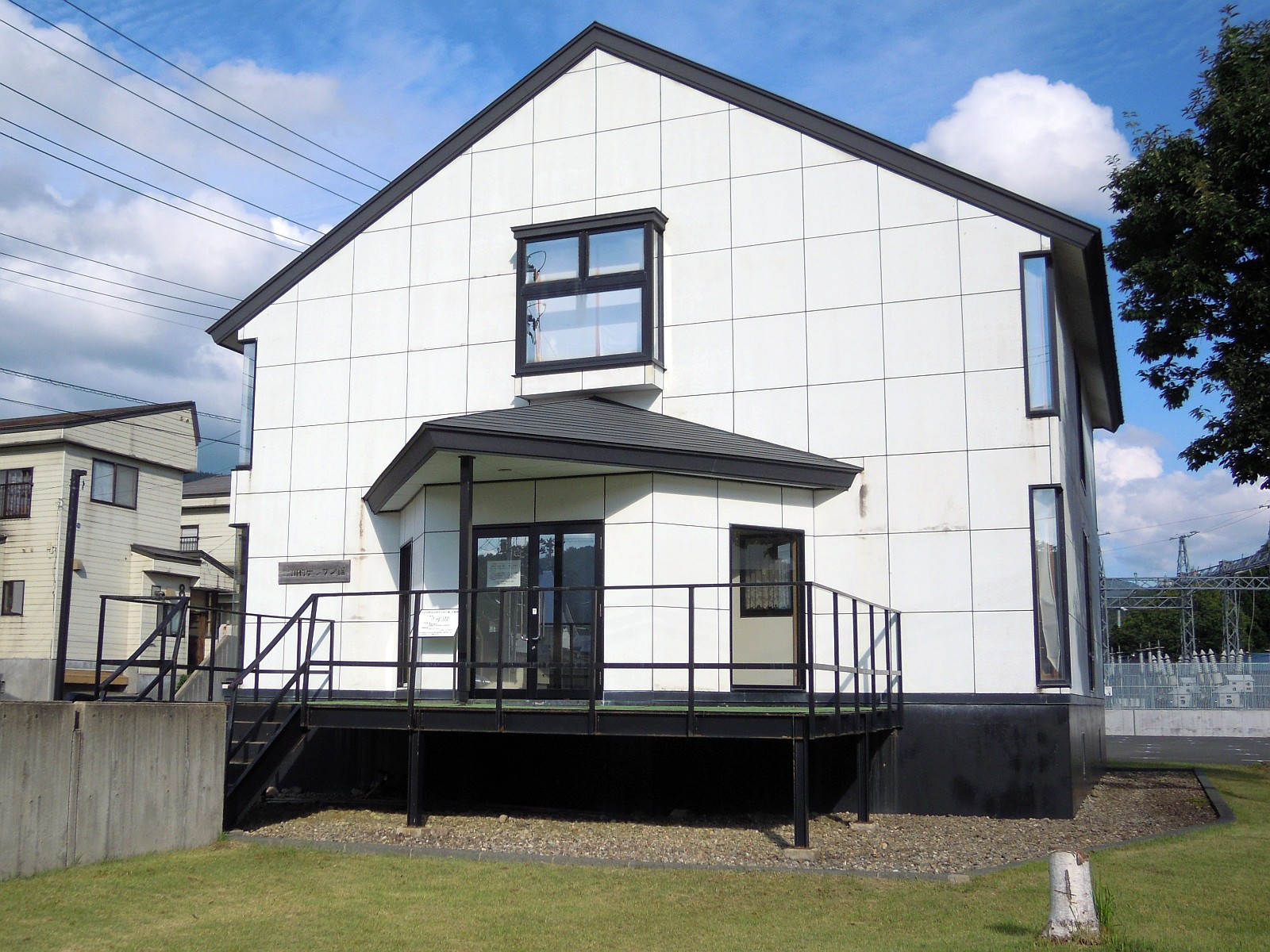 岩手県和賀郡西和賀町にある西和賀町立川村デッサン館